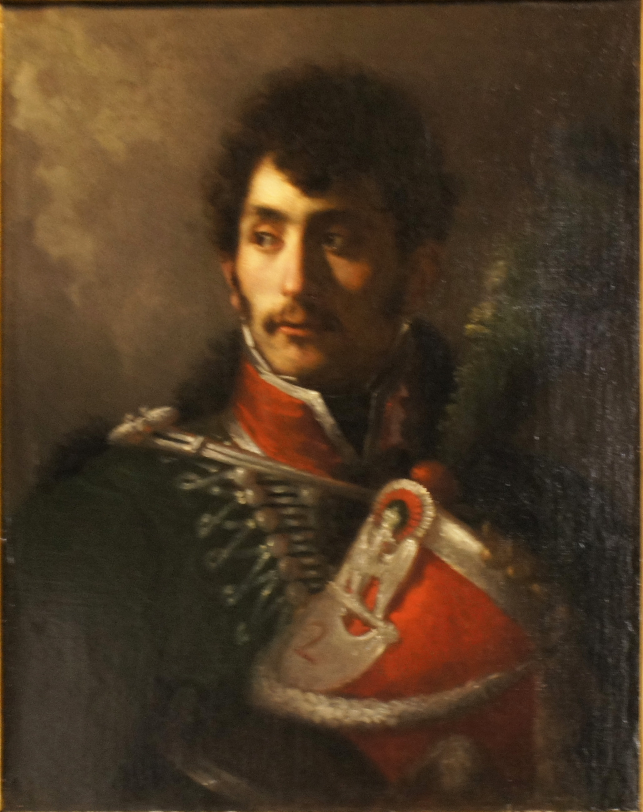 lors de l'exposition la Moskova au Musée st-Remi.